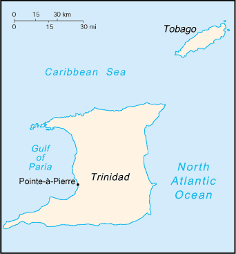 Pointe-à-Pierre